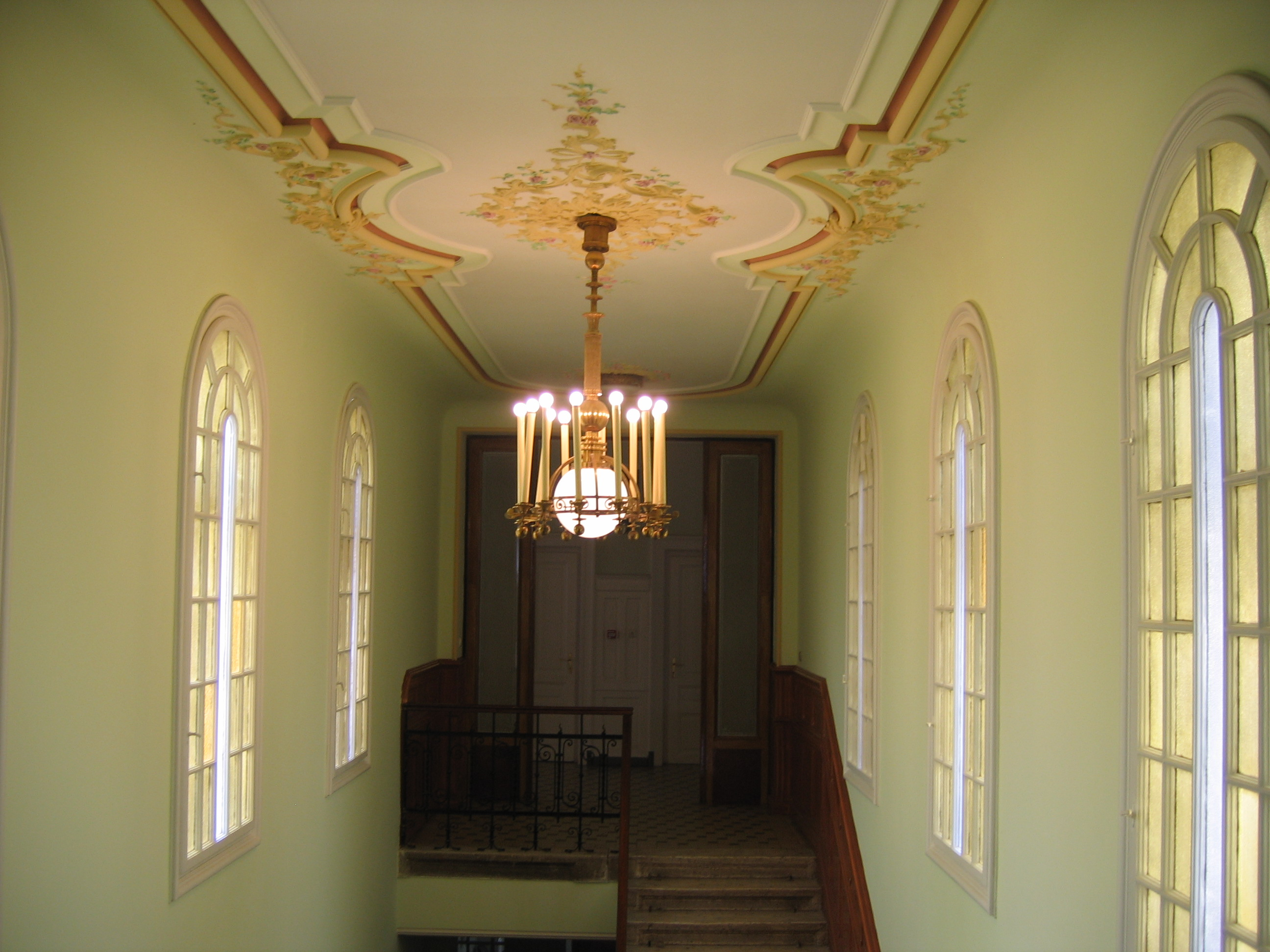 A Tiszti Kaszinó folyosója